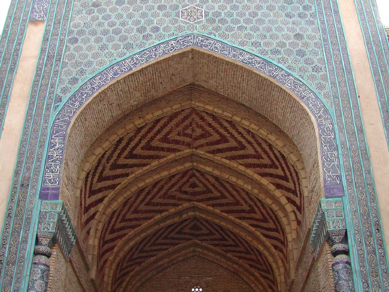 Oʻzbekcha/ўзбекча: Termiz Yodgorliklar Sultan Saodat Maqbarasi